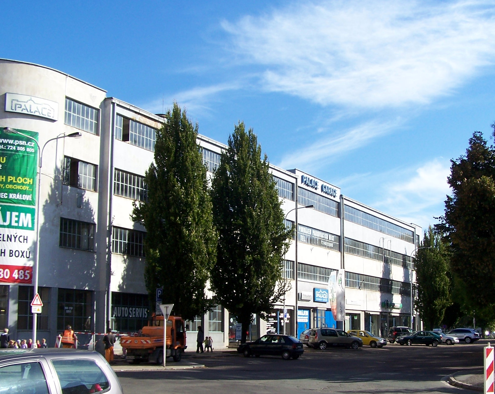 Oldřich Liska: Garáže tzv. Novákovy garáže (Hradec Králové), nám. 5. května 835/10, Hradec Králové